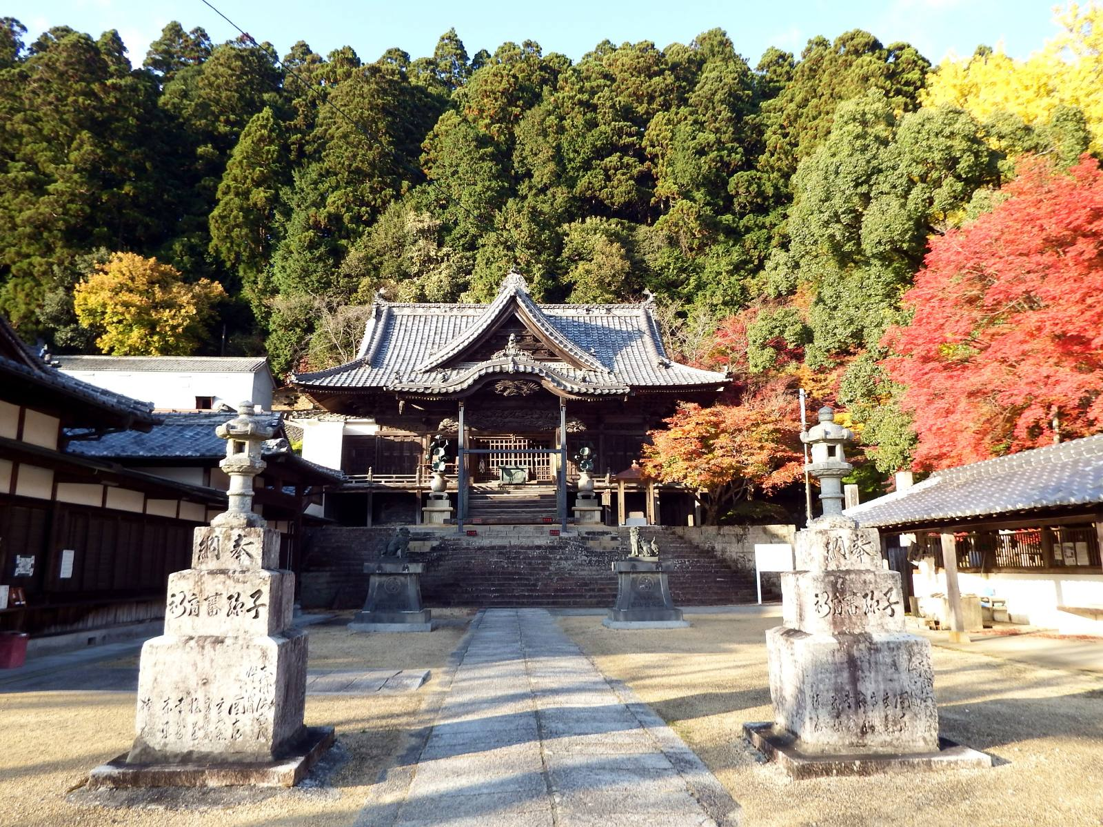 箸蔵寺の護摩殿